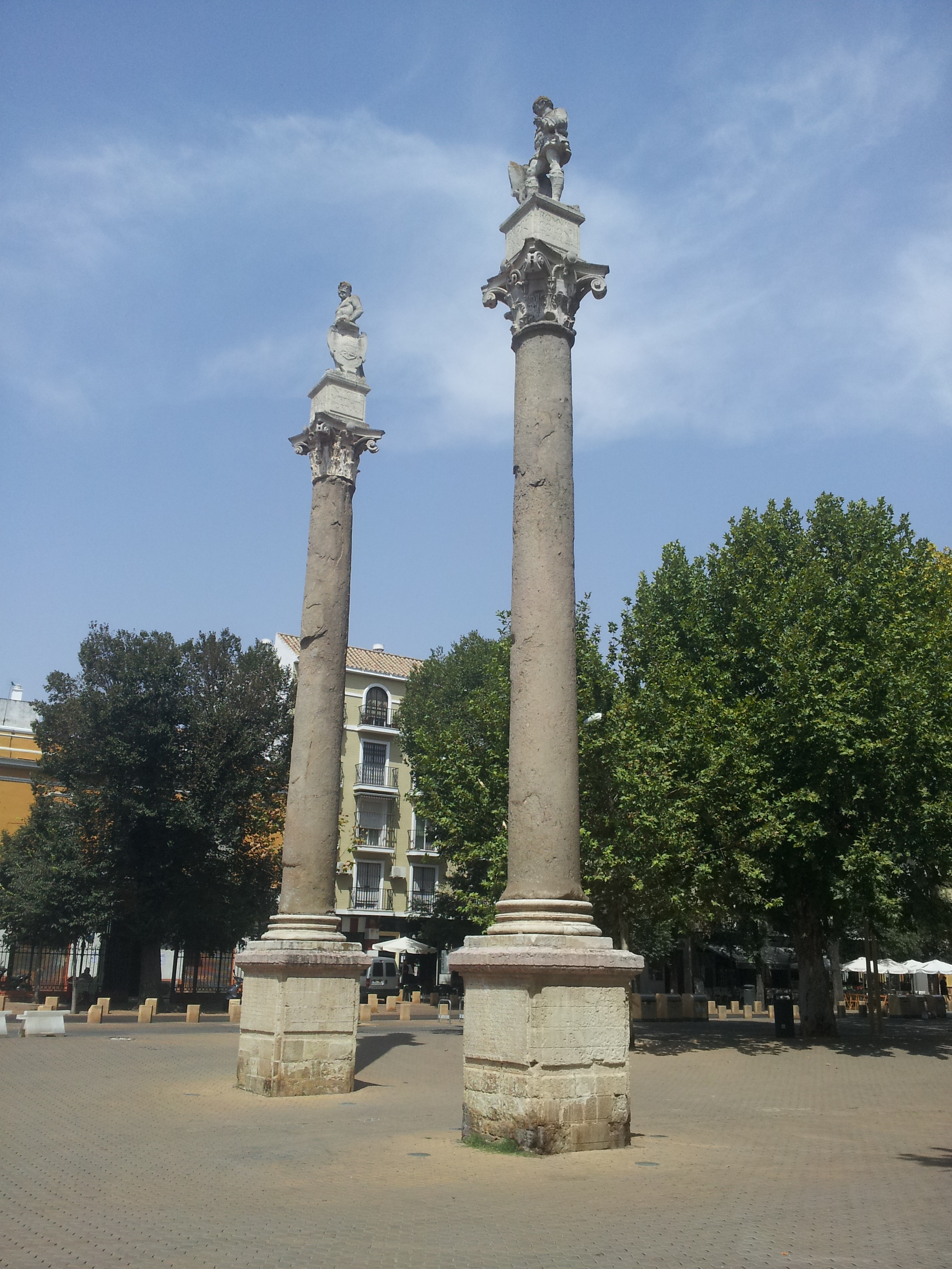 Alameda de Hércules (Sevilla); agosto de 2013